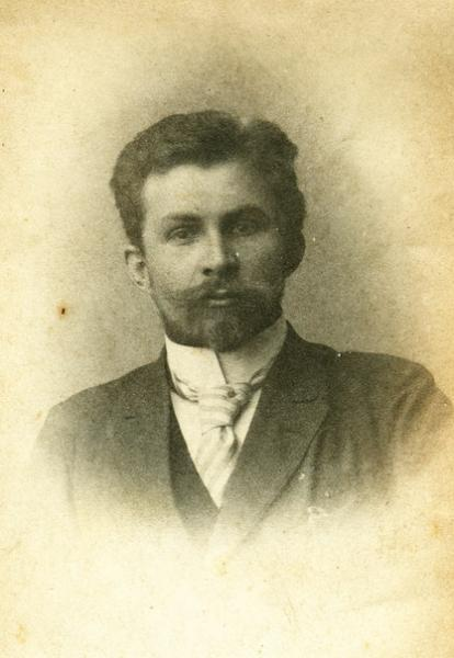 Władysław Pochwalski